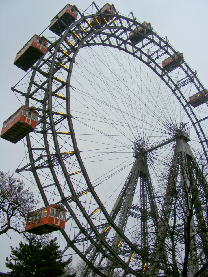 Vienna Prater Ferris Wheel